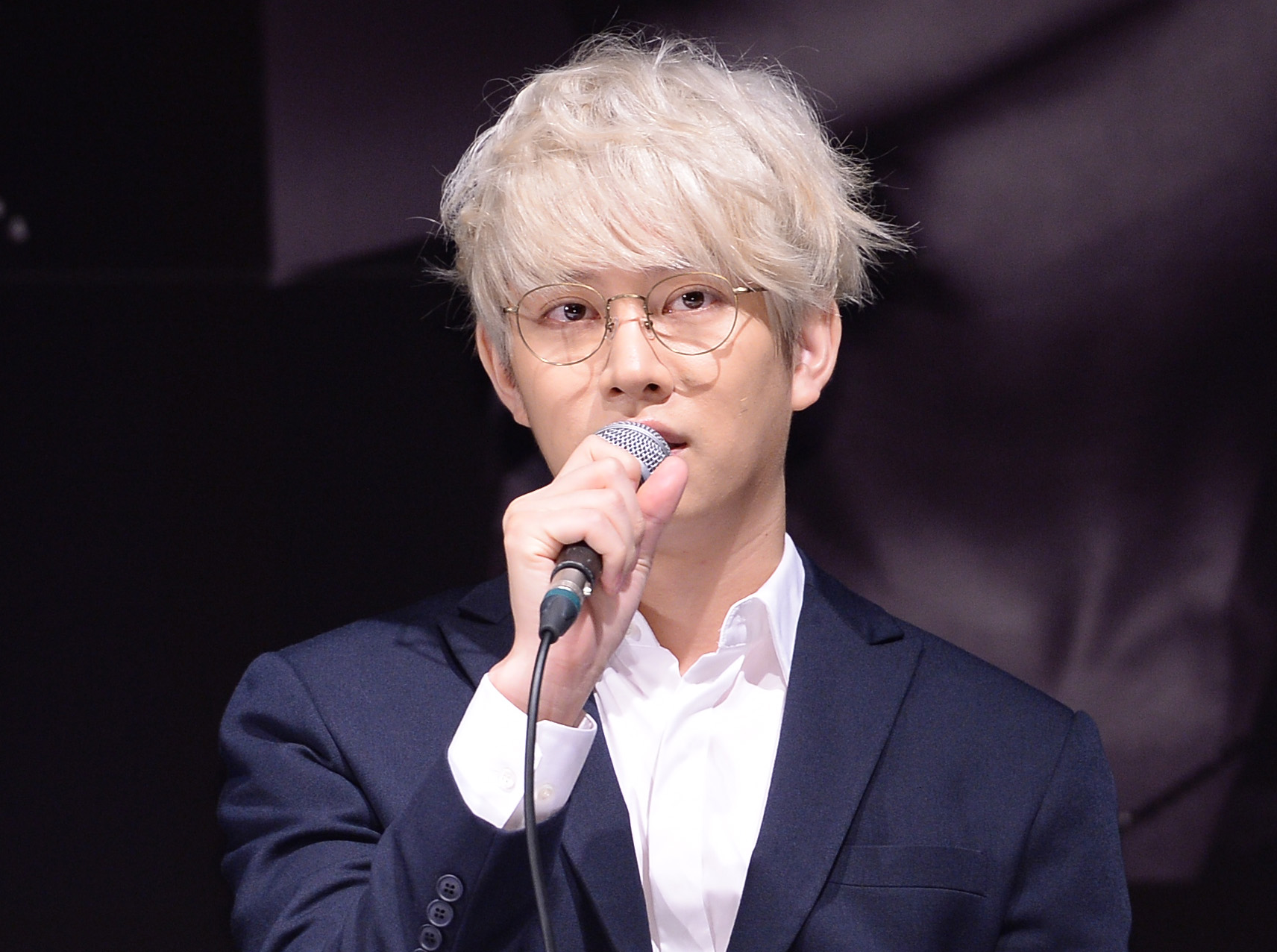 슈퍼주니어 멤버들이 15일 오후 서울 강남구 삼성동 코엑스 아티움에서 열린 스페셜 앨범 'Devil' 발매 기념 기자회견에서 인사를 하고 있다. 2015.07.15 / 이석우 기자